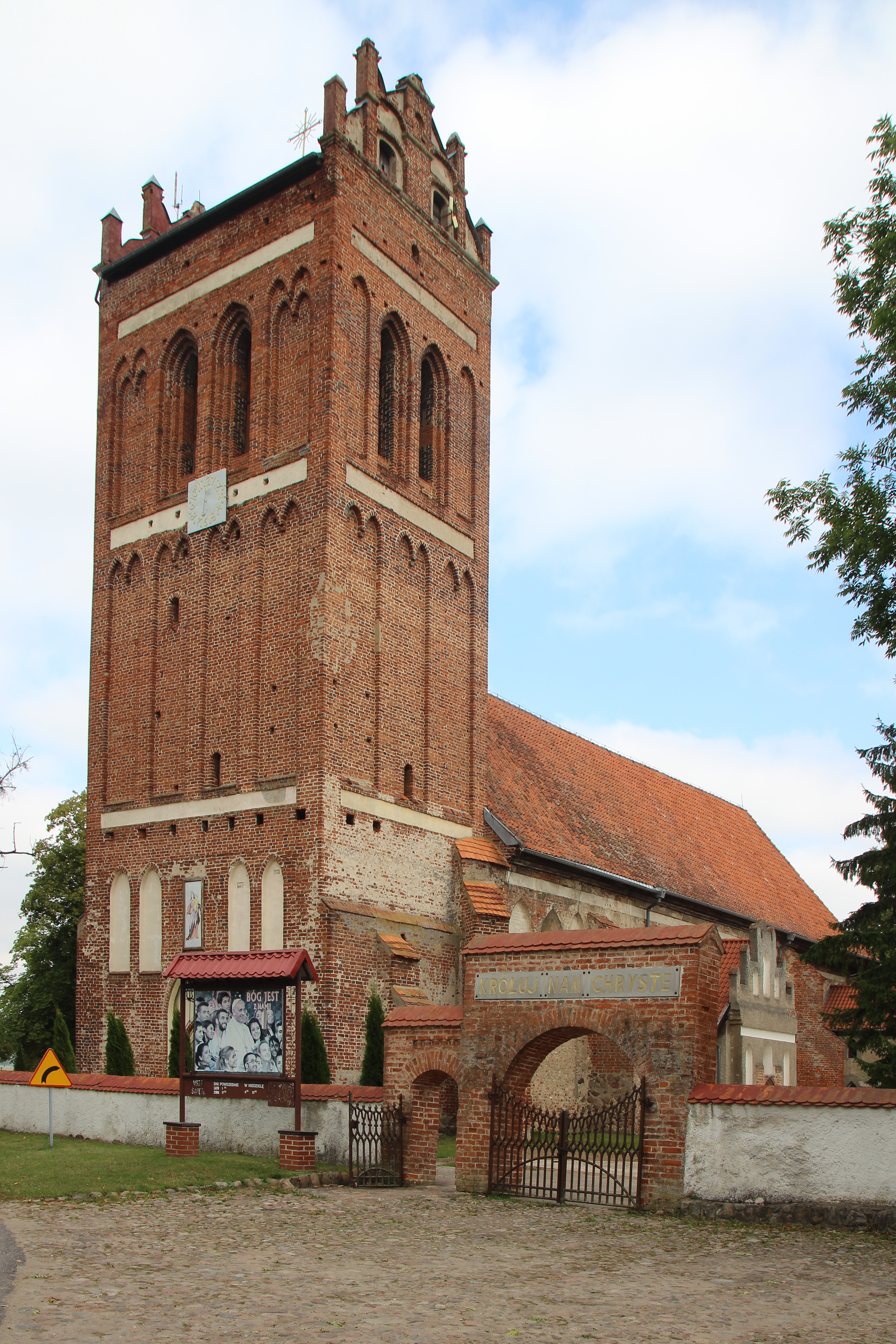 Sątoczno - rzymskokatolicki kościół parafialny p.w. Chrystysa Króla z wyposażeniem wnętrza, 2 ćw. XIV, 1839-1942